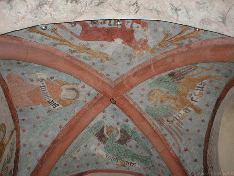 Deckengemälde im Chor der St.-Mauritius-Kirche in Osterburgen-Hemsbach